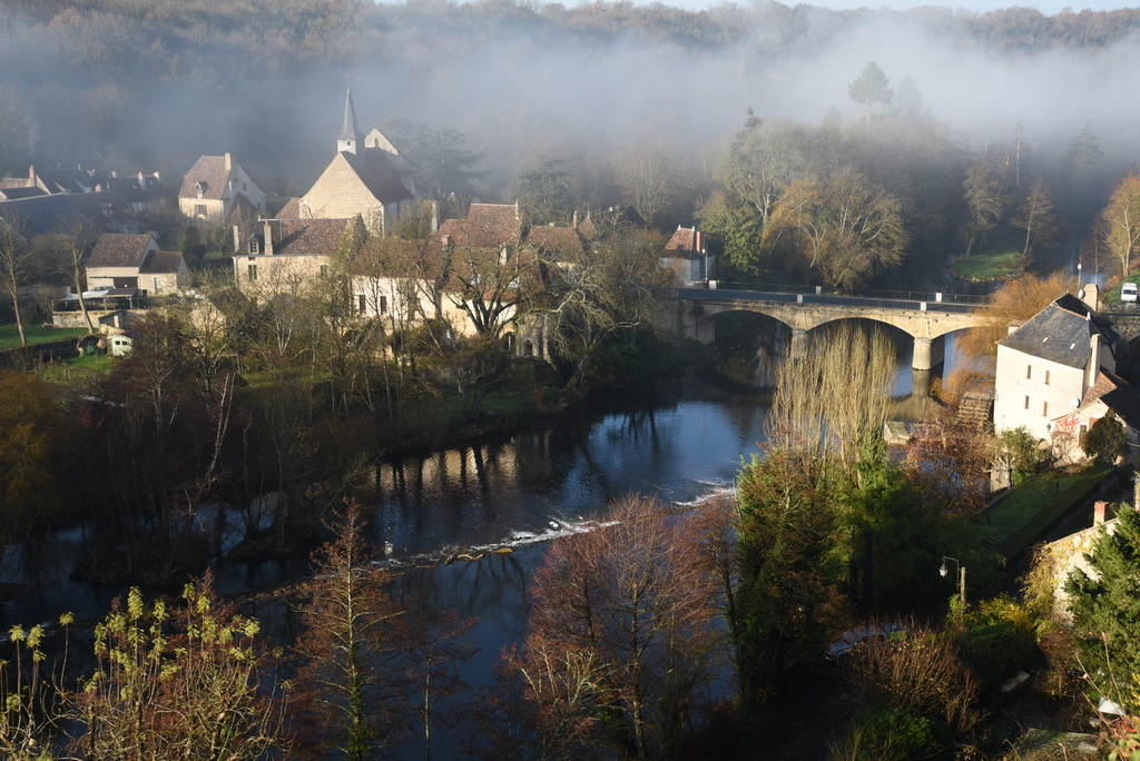 La chapelle sainte croix de ville basse avec le pont et l'écluse sur l'Anglin